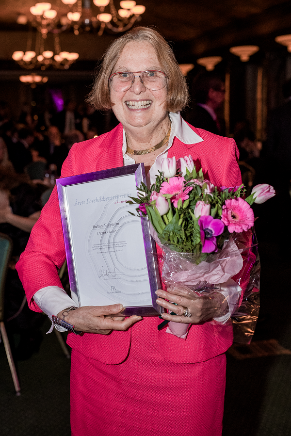 Barbara Bergström